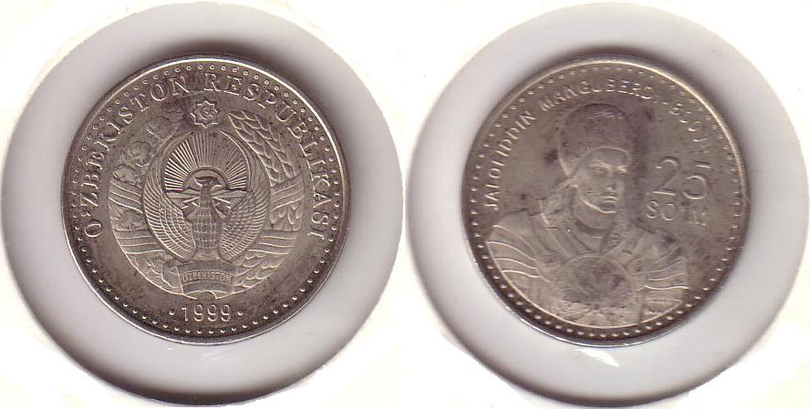 Oʻzbekcha/ўзбекча: 25 So'm